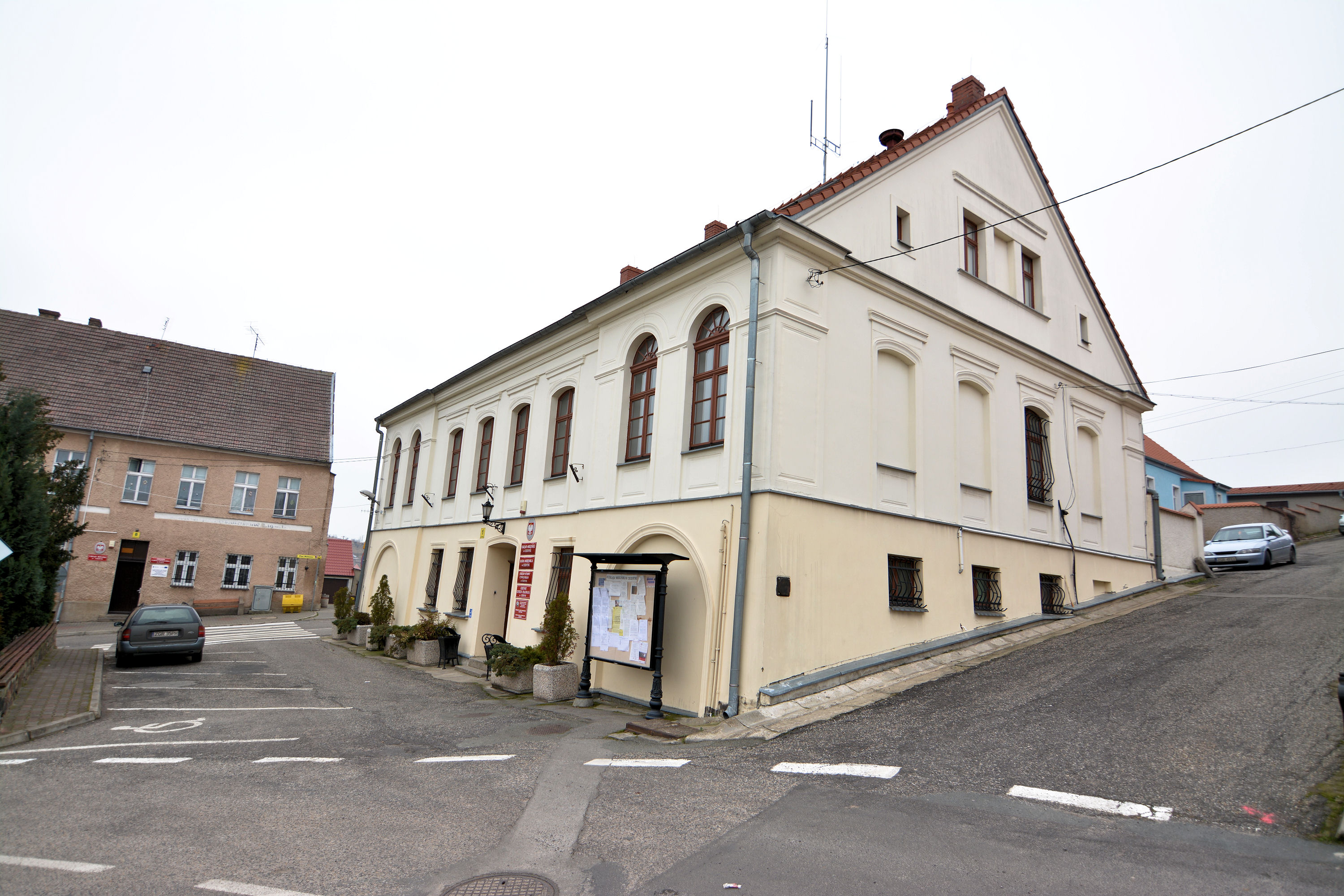 Cedynia, pl. Wolności 2 - ratusz, 1840 12.1965.